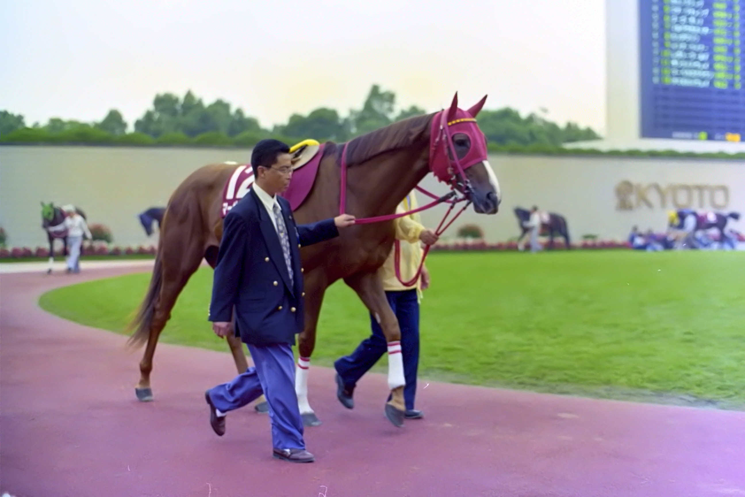 マーベラスクラウン 1995年10月8日 京都競馬場